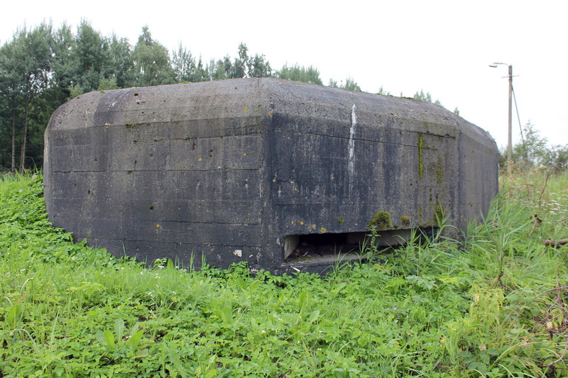 07134 ДОТ №26 Координаты для GPS (WGS 84): N 59° 23' 4.704 E 28° 28' 46.564 Расположение: д.Новопятницкое, 4,5 км западнее Большелуцкое сельское поселение Описание: ДОТ №26. 2-х амбразурный пулеметный ДОТ. Кингисеппский укрепленный район (№21). Поселковый батальонный район обороны. 3 рота 263-го ОПАБ. Направления стрельбы: 210° и 330°. Оборудован входом типа "тупик". Техническая справка: 2-х амбразурные ДОТы имеют один боевой каземат и были оснащены деревянными станками системы Горносталева обр. 1931 г. (ПС-31 "СТАД") под 7,62-мм станковый пулемет системы Максима обр. 1910 г. или обр. 1910/30 г. От станков остались, в основном, остатки крепления (швеллеры) и амбразурные узлы с пулеметными заслонками П-31. По нормативам, сектор обстрела пулемета составлял 60° (т. е. +/-30°), углы возвышения/снижения - +/- 5°. Боезапас на каждый пулемет - 6000 патронов 7,62x54 мм или М1908/30 в коробках с лентами в каземате + 30000 дополнительный в тех. помещении. ДОТы имеют ружейные амбразуры защиты входа, на большинстве из которых сохранились ружейные заслонки обр. 1931 г. (РЗ-31).